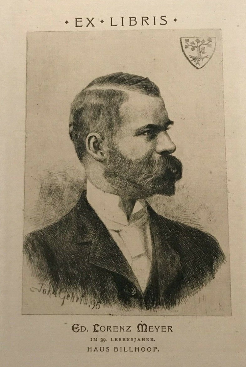 Johannes Gehrts - Ex libris Ed. Lorenz Meyer, 1895. Radierung